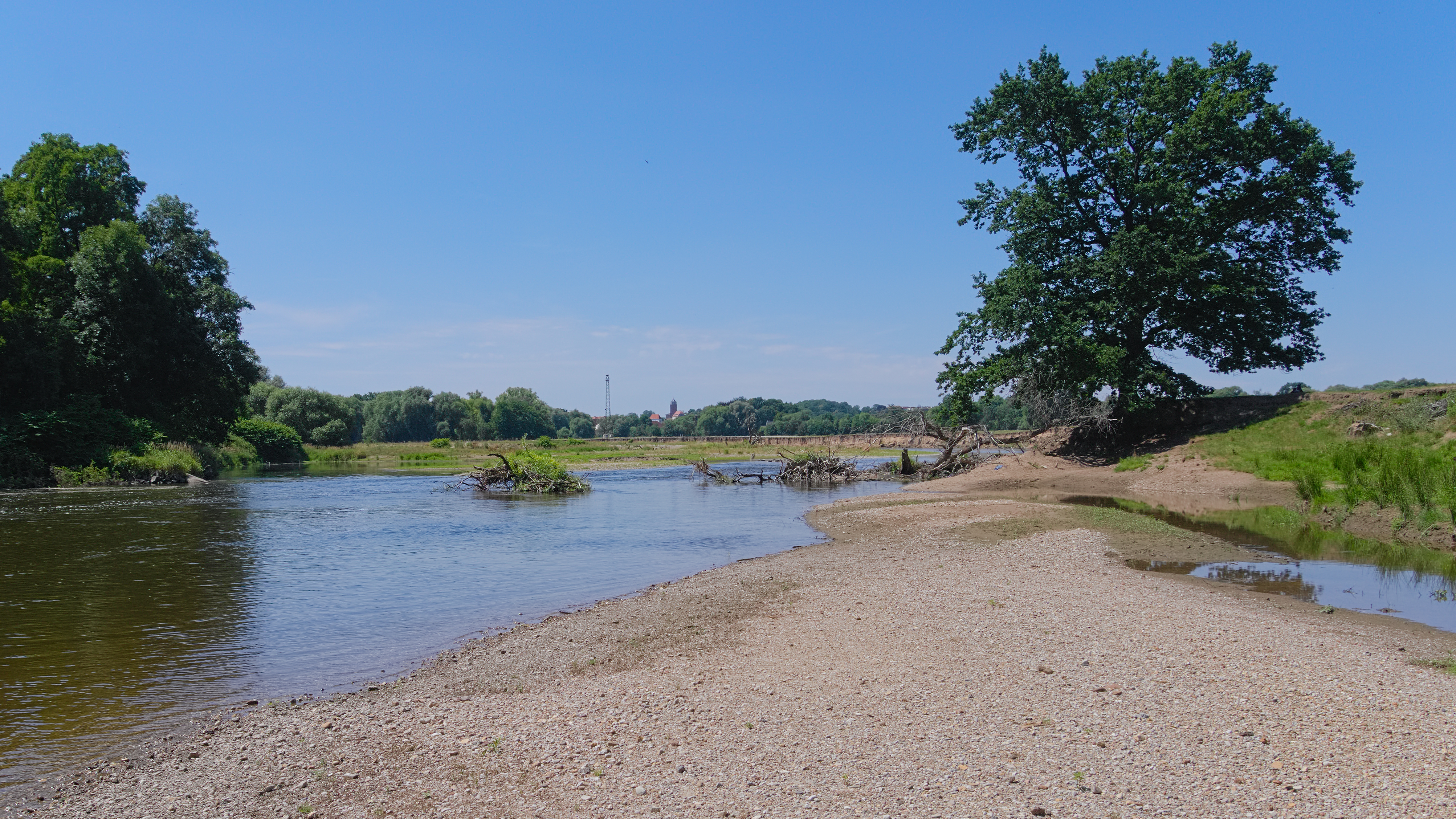 Mulde. Aufgenommen in Eilenburg, Sachsen, Deutschland.